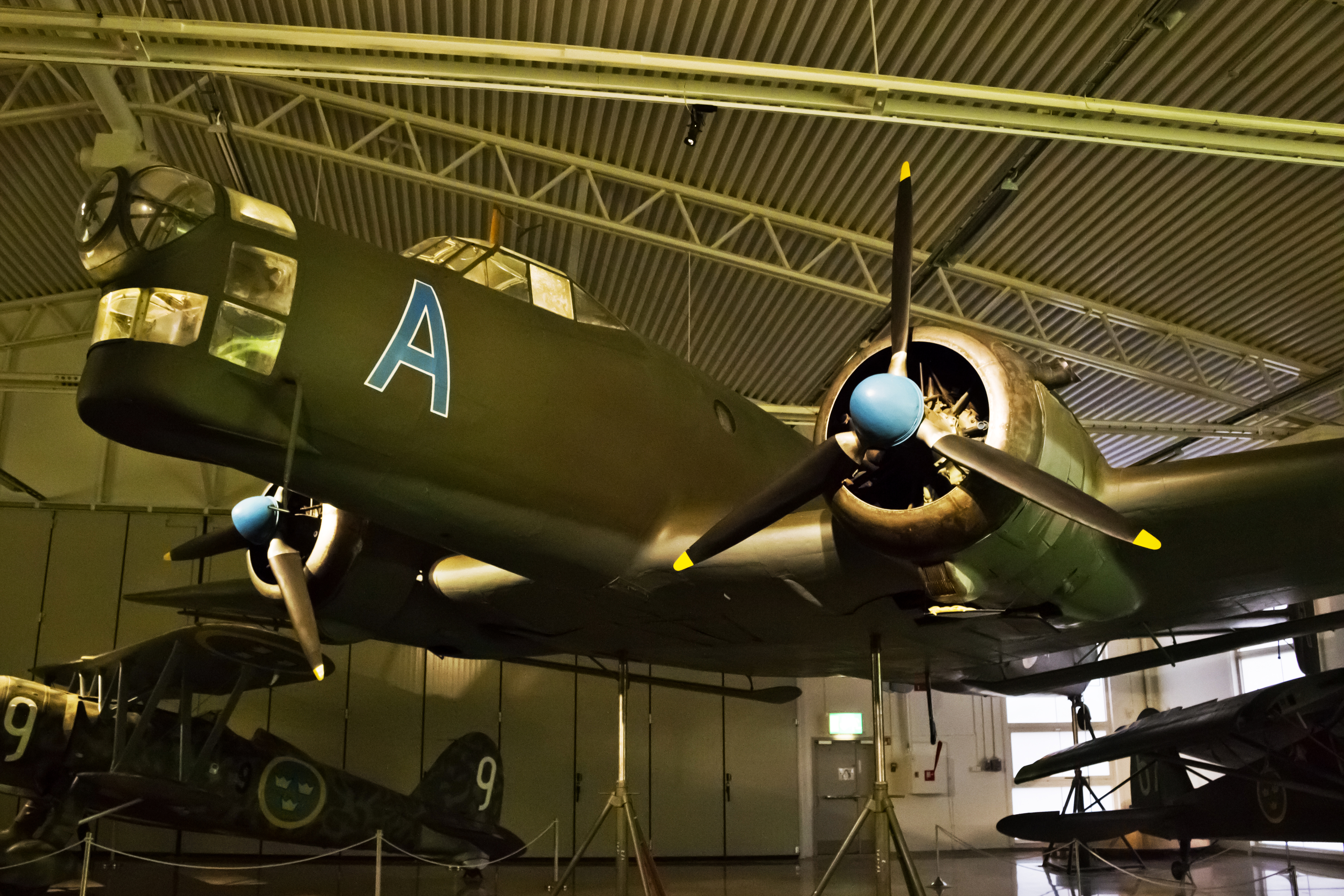 Junkers Ju 86 no museo da Forza Aérea Sueca, Flygvapenmuseum, en Linköping.